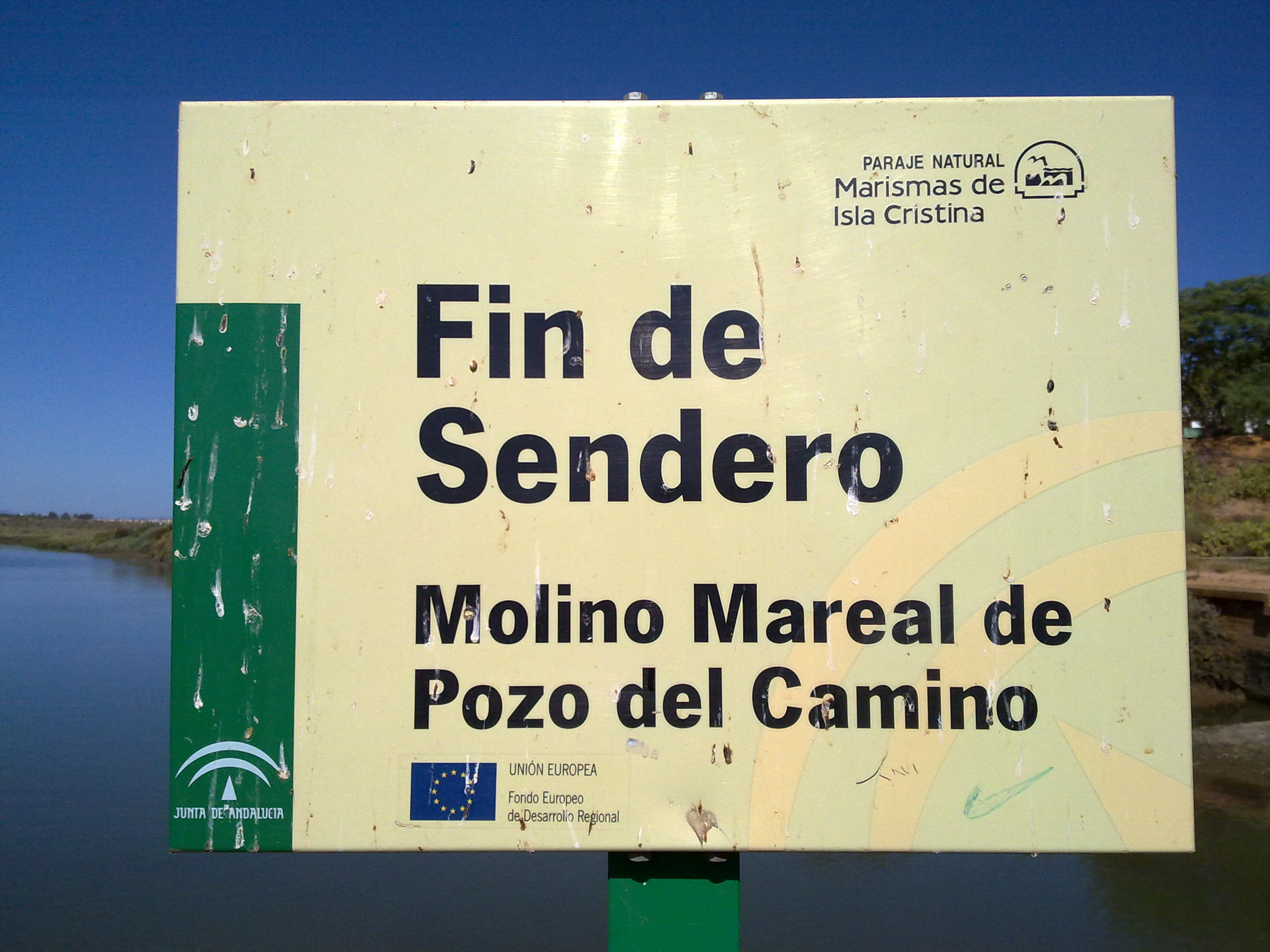 Placa donde se indica el fin del sendero que lleva al molino de mareas de Pozo del Camino y ecomuseo de Isla Cristina.